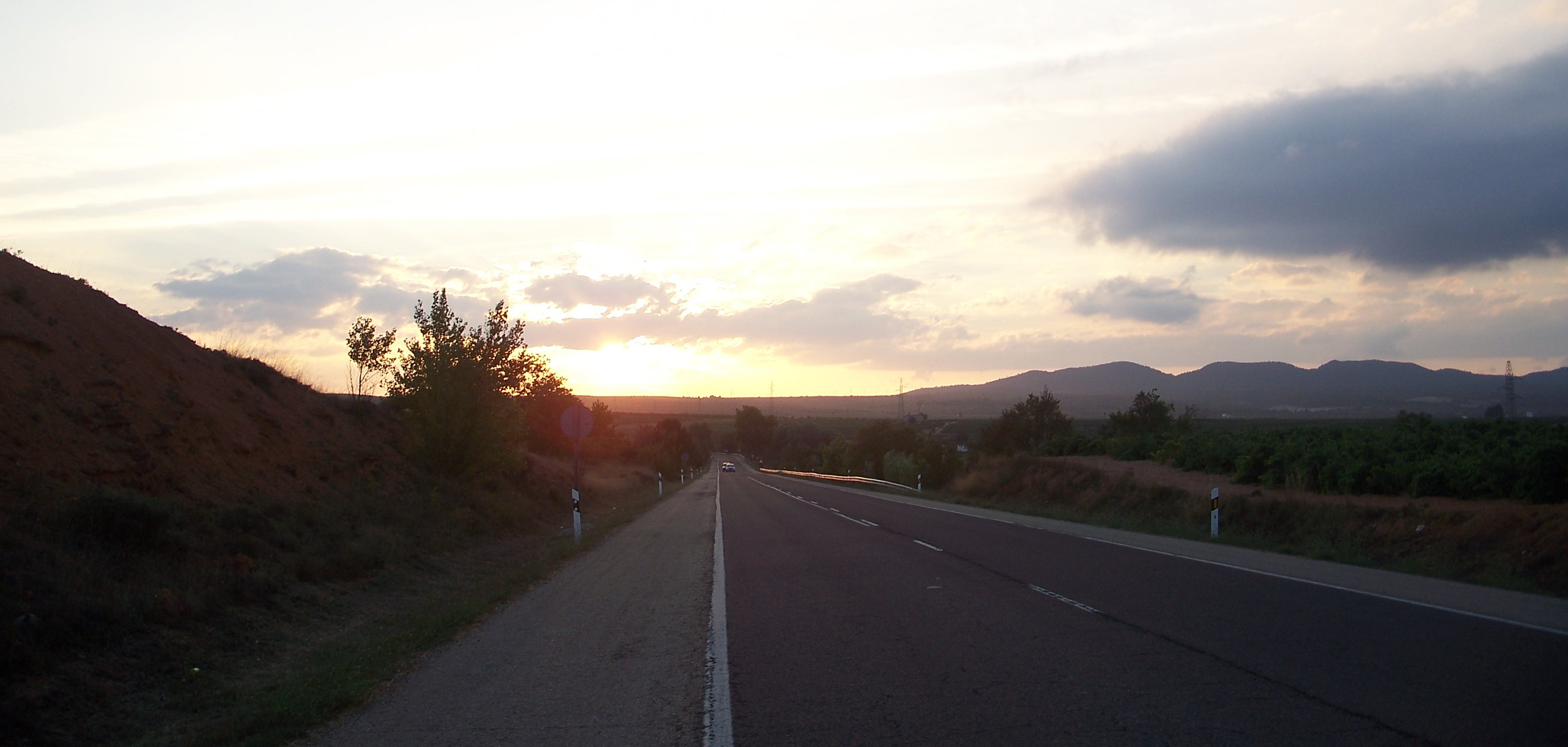 Valencià: La N-III al terme municipal de Caudete de las Fuentes, València (Espanya)